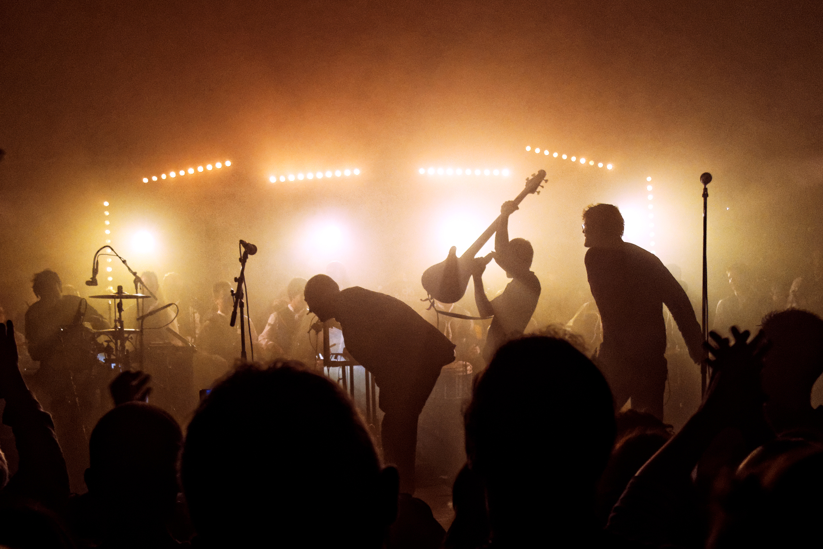 Merzhin en concert pour les 20 ans du bagad Bro Landerne au festival Kan al Loar le 13 juillet 2015.